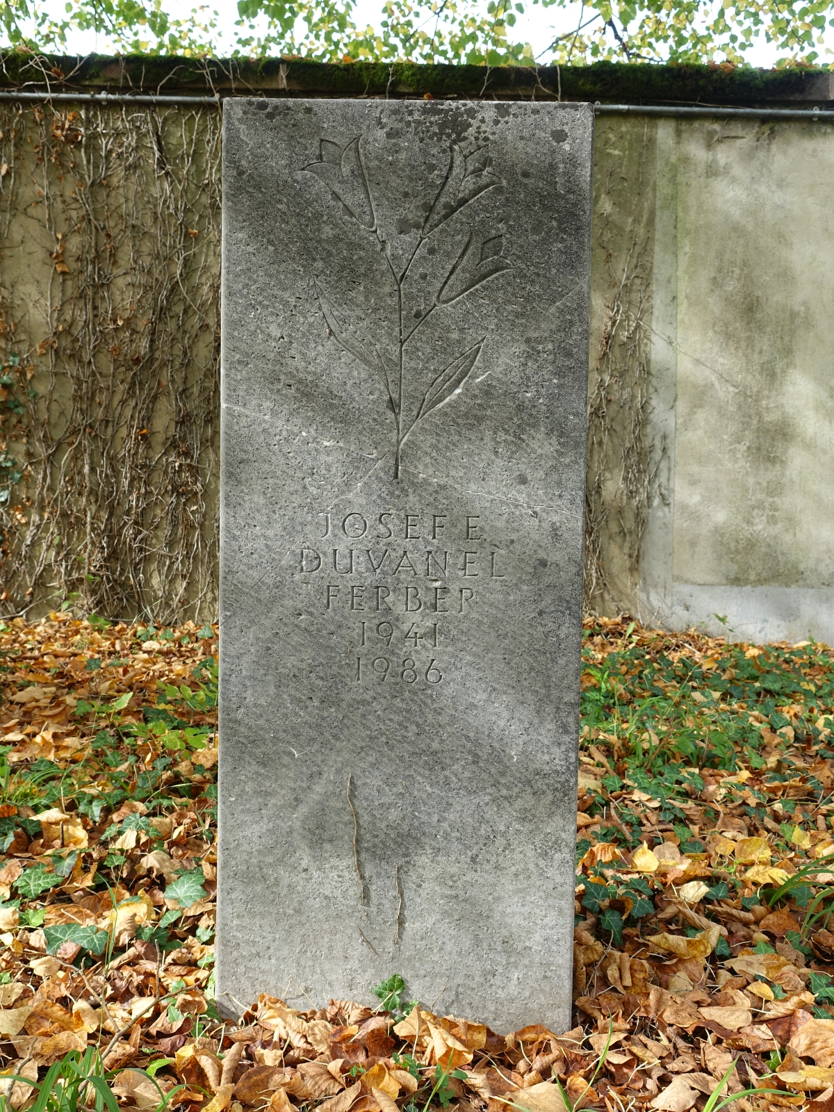 Josef Edward Duvanel (1941–1986) Künstler, Prominenten Grabfeld, Friedhof Hörnli